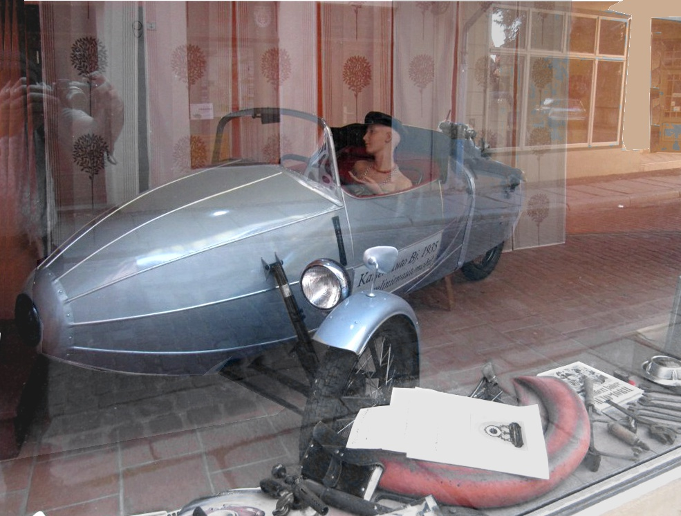 Kaiser Stromlinien-Sportwagen, Baujahr 1935 in Oschersleben (restauriert), Objekt wurde im Schaufenster des Mitteldeutschen Modellbahn- und Spielwarenmuseums in Quedlinburg aufgenommen, daher leider die Spiegelungen